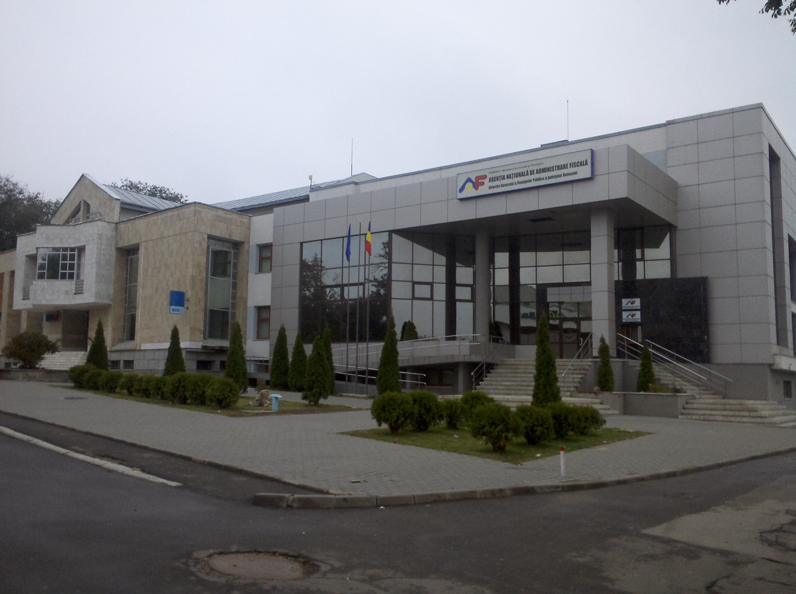 caixa en Dorohoi